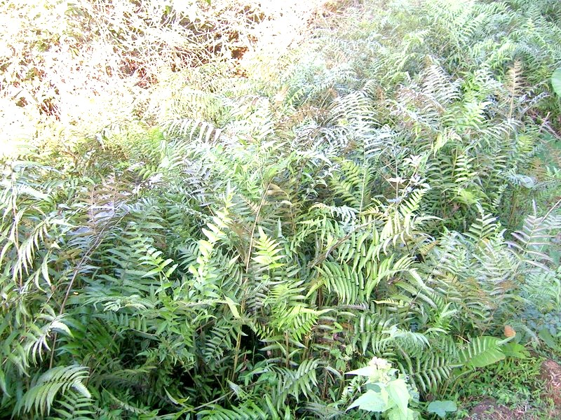 Diplazium esculentum from the Talakaveri area